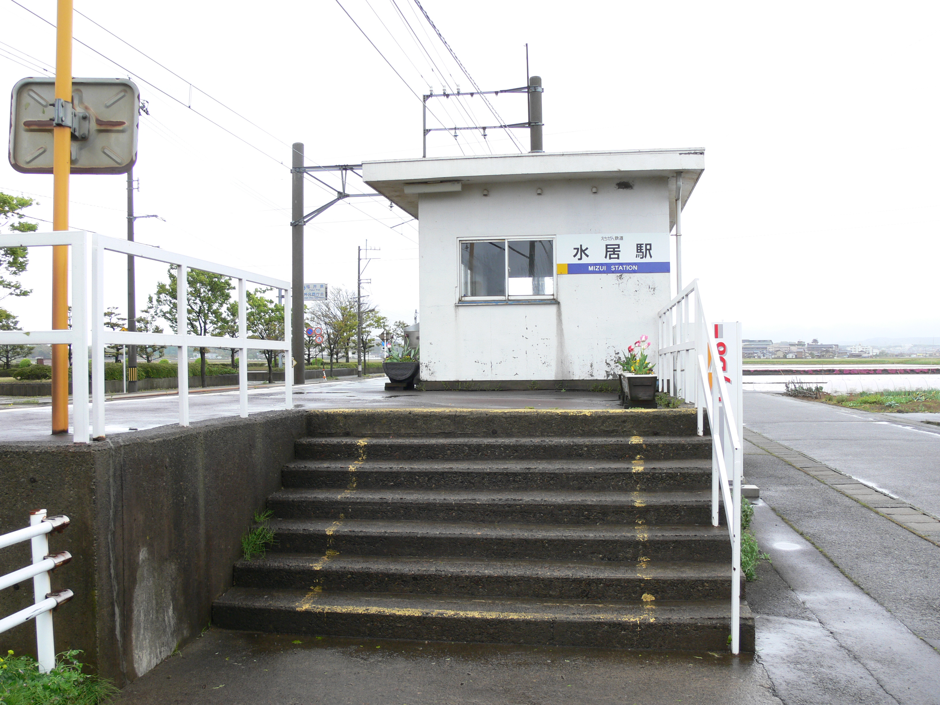 Mizui Station